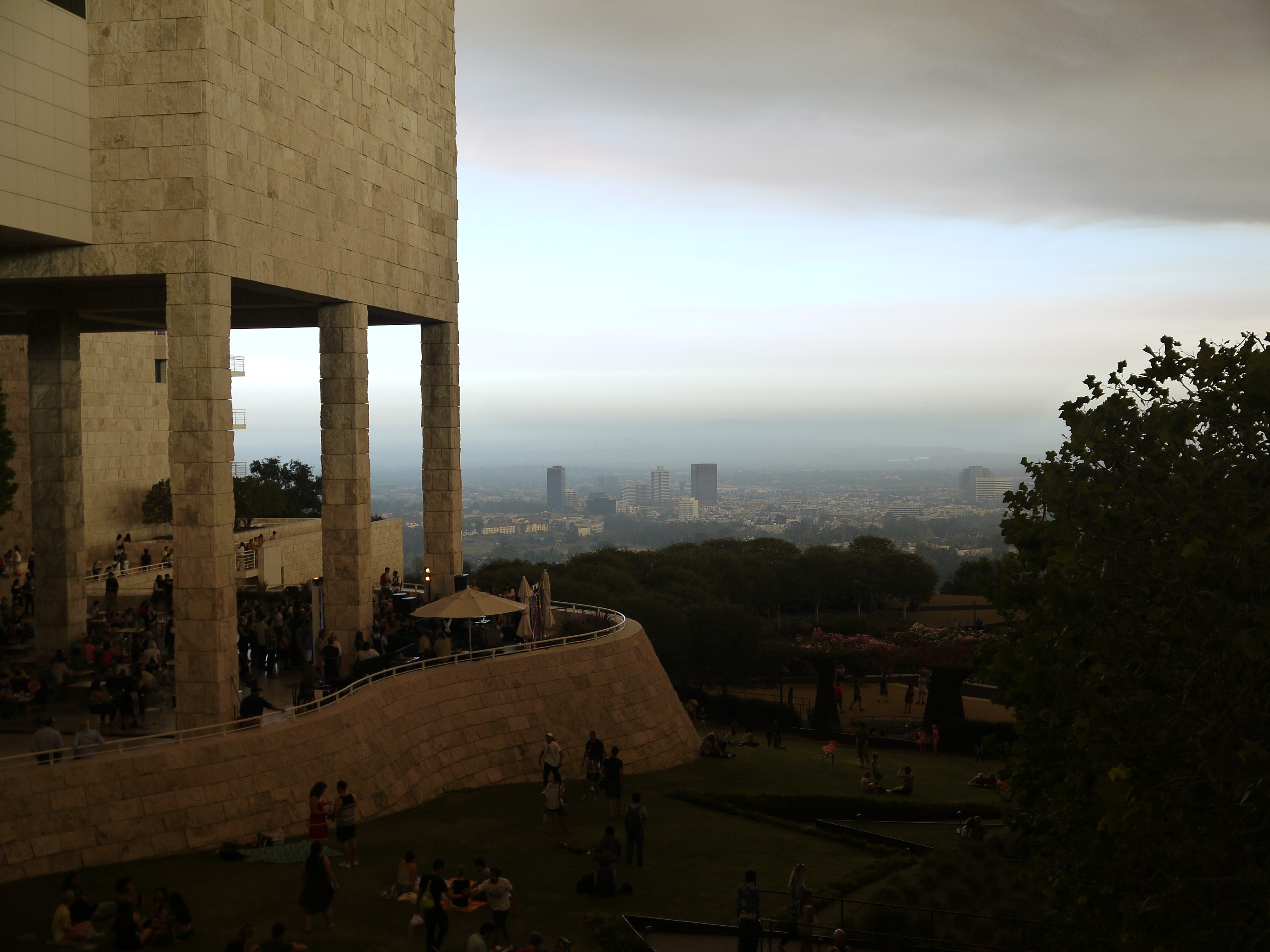 Blick vom Getty Center auf die Innenstadt von Los Angeles.